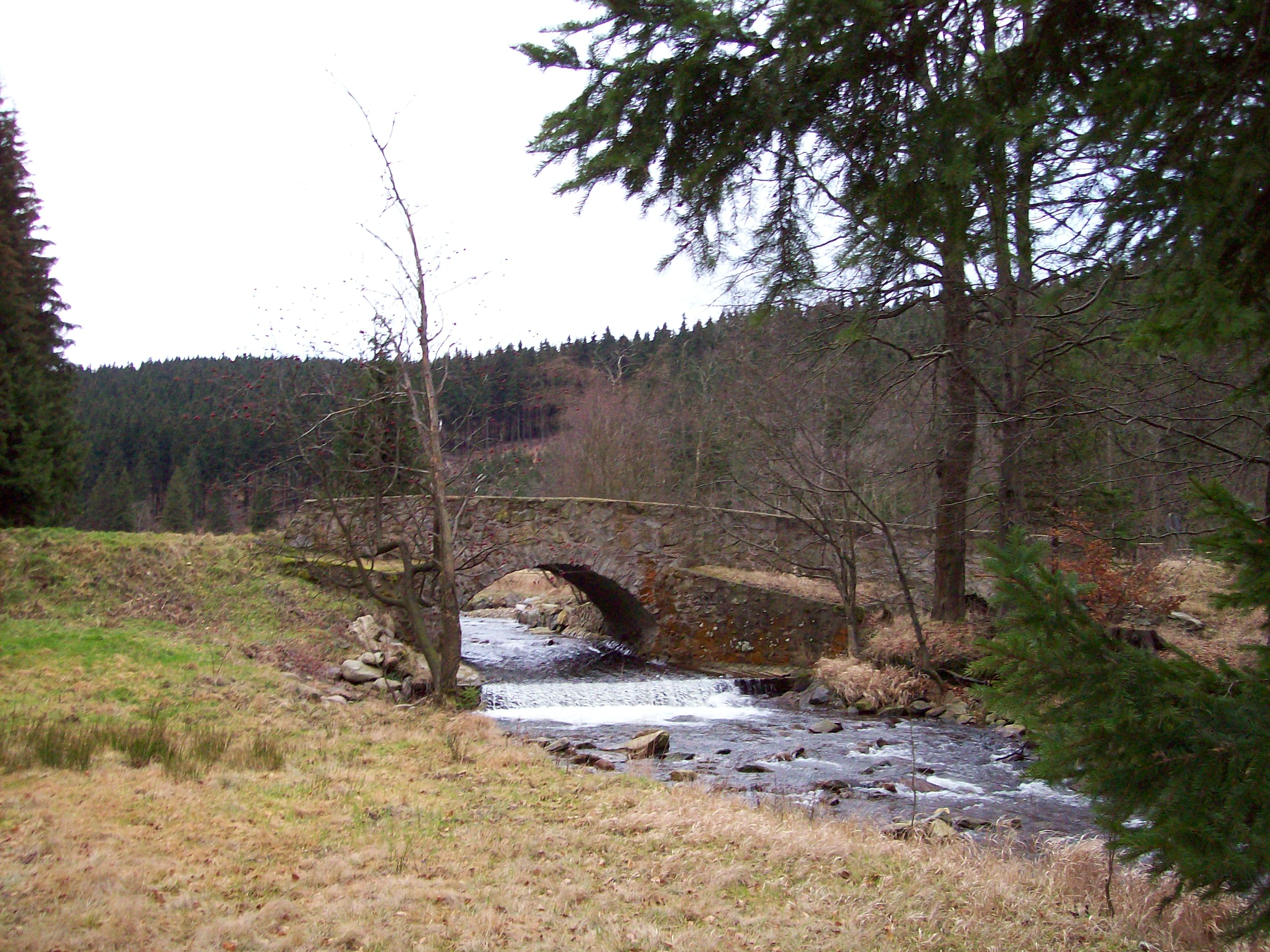 Alte Zinnbrücke Seyde über die Wilde Weißeritz